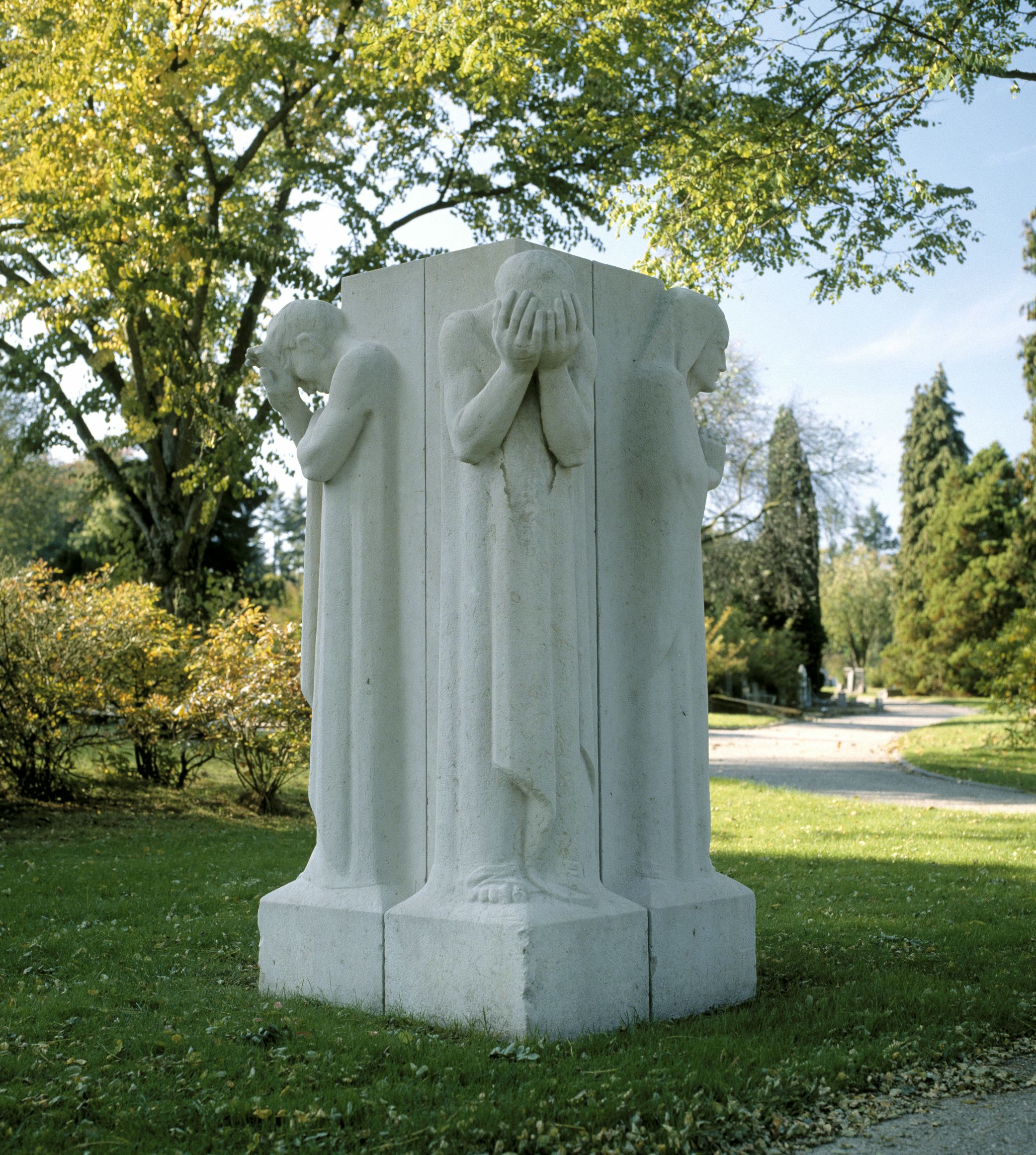 Begraafplaats Moscowa - Oorlogsmonument: Overzicht beeld - monument ter ere van de oorlogsslachtoffers (opmerking: Gemaakt voor Nationaal Comité 4 en 5 mei / Stichting '40 - '45)